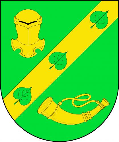 Řitka znak